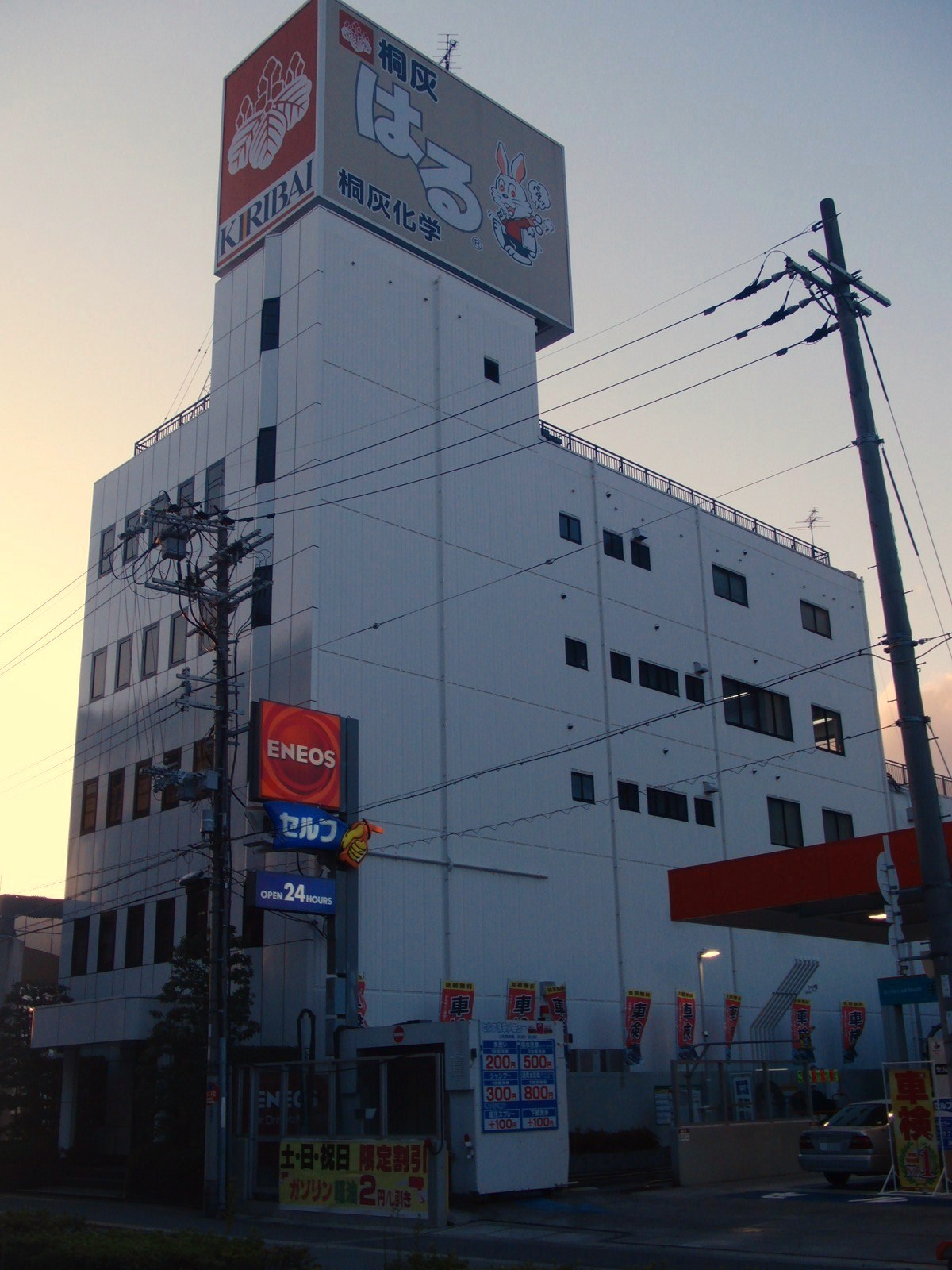 桐灰化学本社を撮影